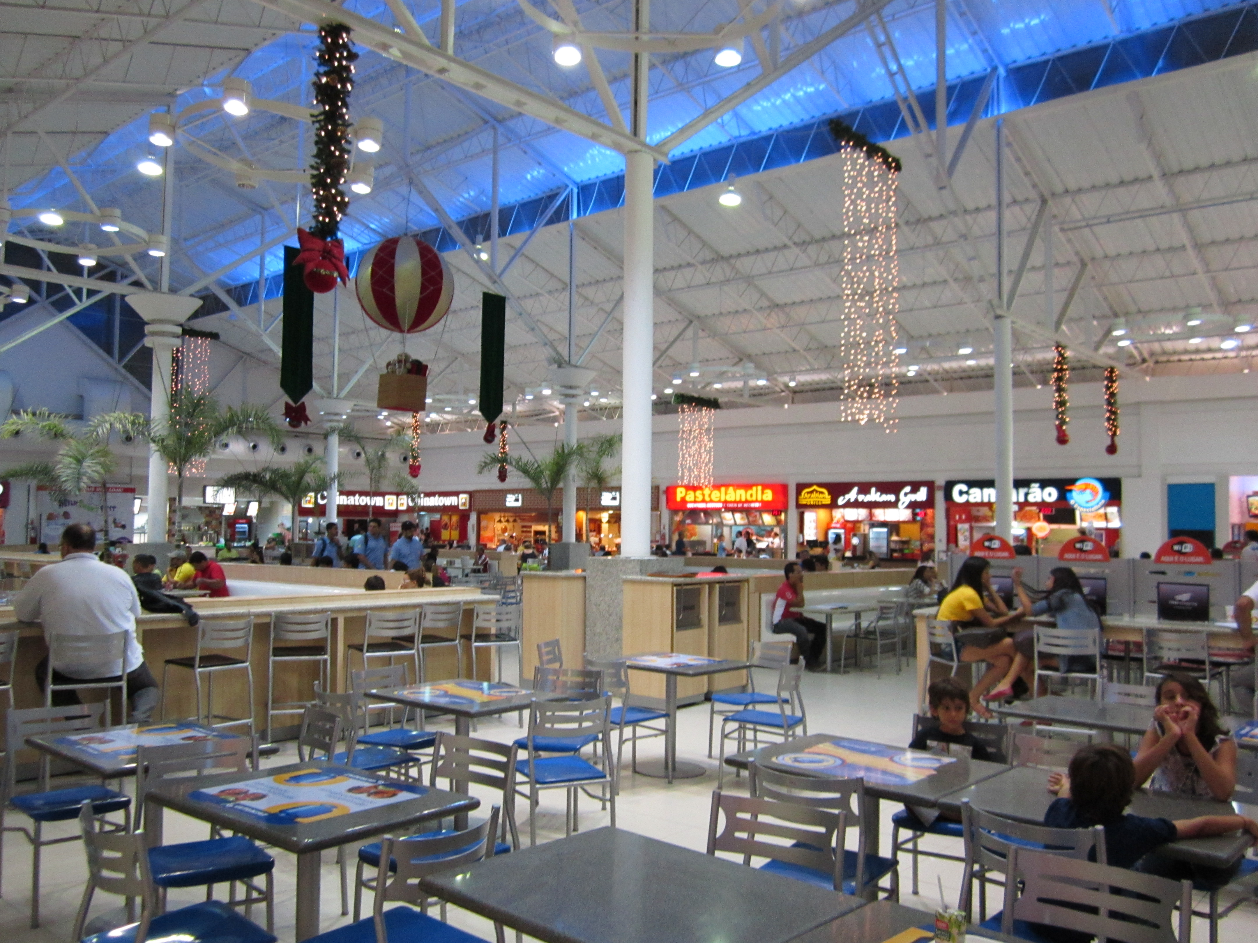 Praça de Alimentação do River Shopping - Petrolina, Pernambuco, Brasil.